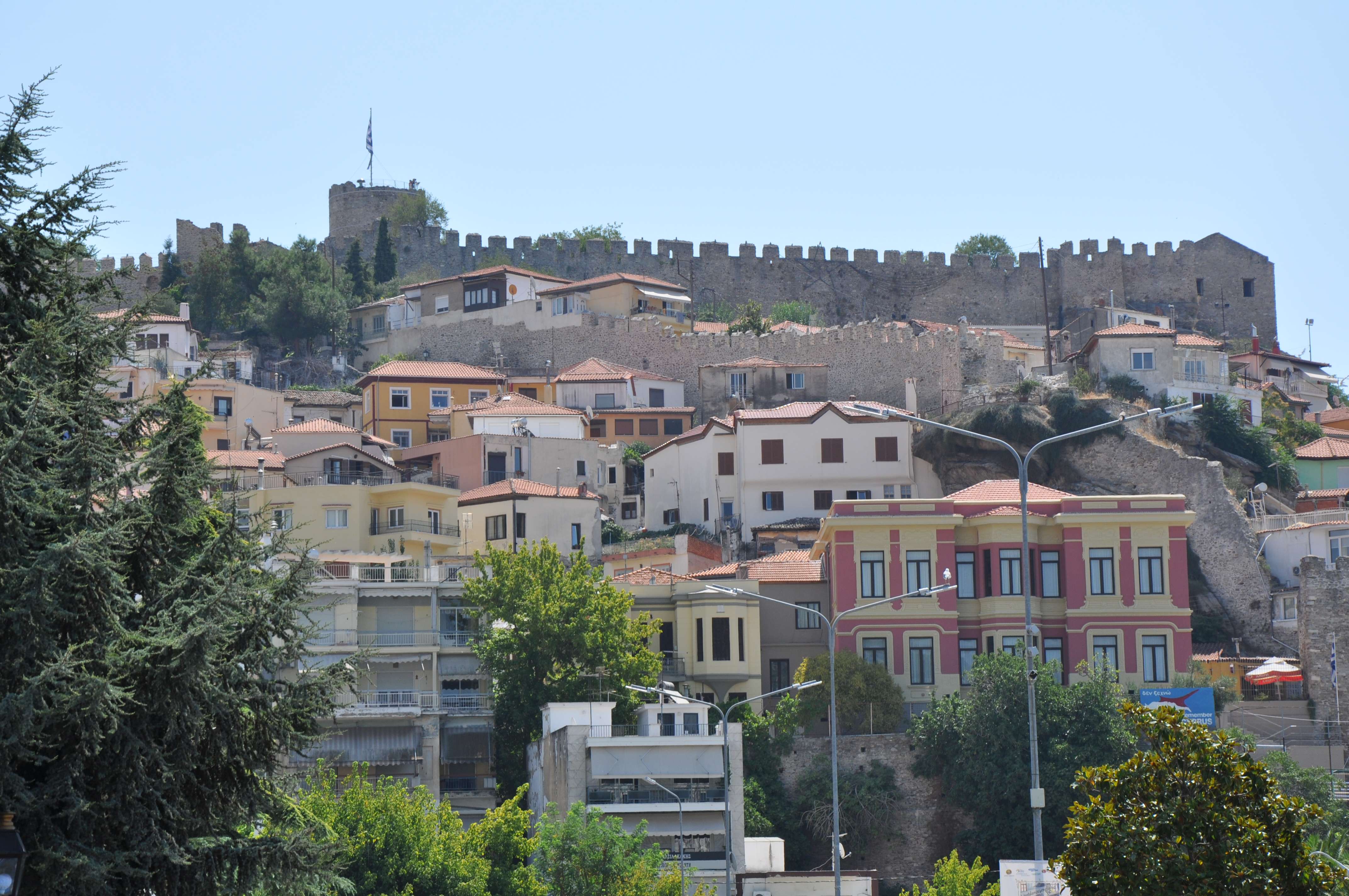 Χερσόνησος Παναγιά Καβάλας, με το τείχος και το κάστρο«Χερσόνησος Παναγιά Καβάλας, με το τείχος και το κάστρο»